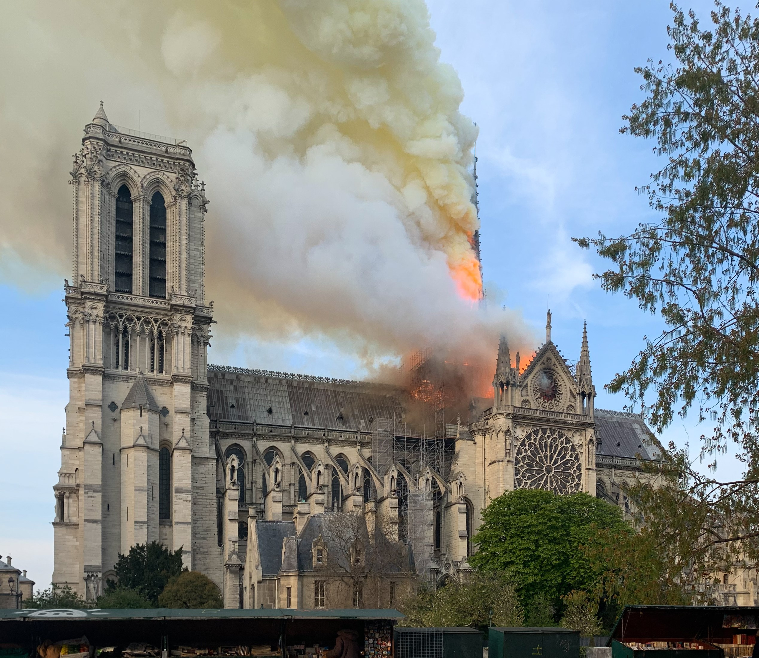 Photo de Notre-Dame de Paris le 15 avril 2019 à 19h17 prise du Quai de Montebello